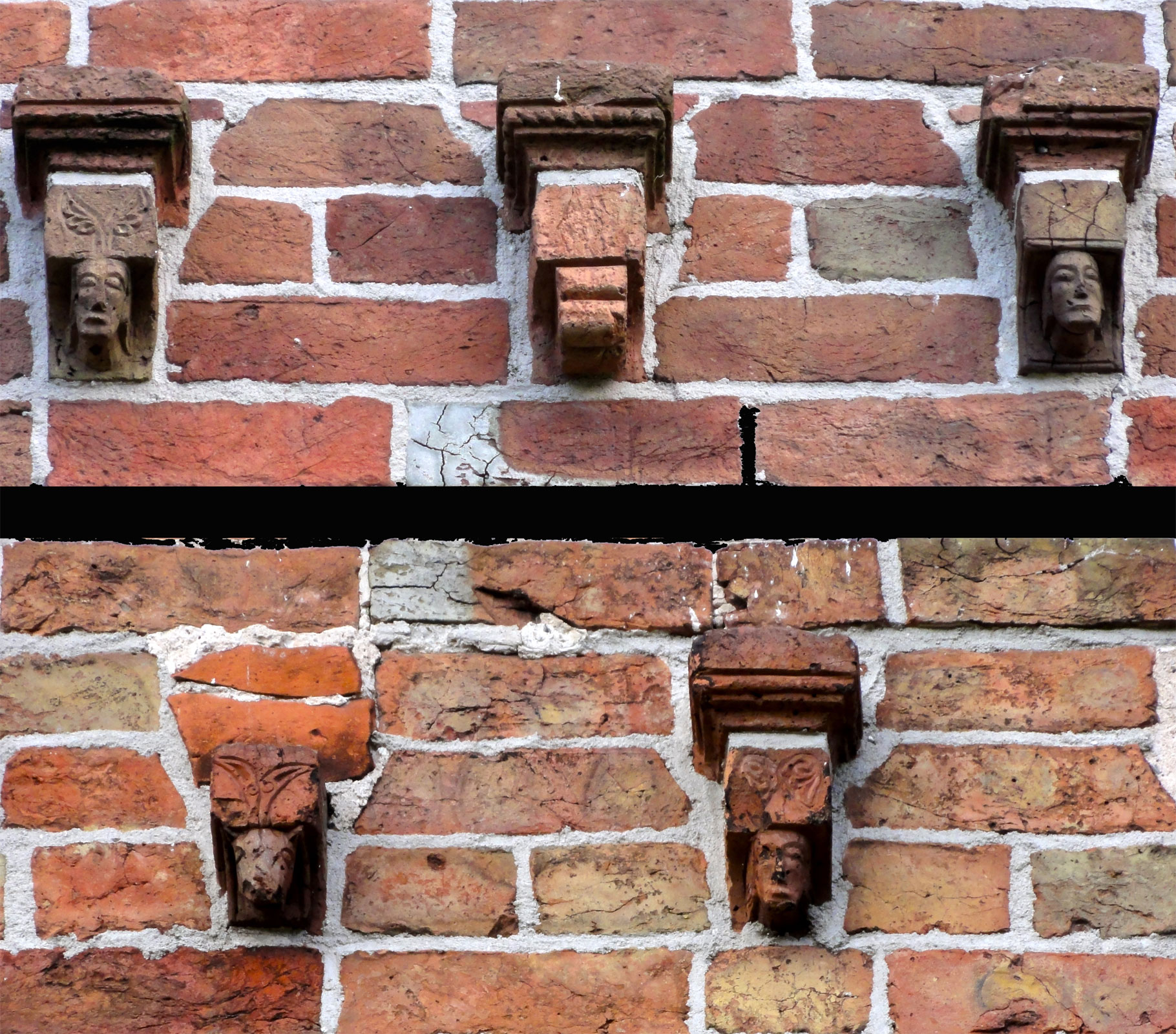 Sint-Gangulfuskerk in Ee (detail: enkele consoles)